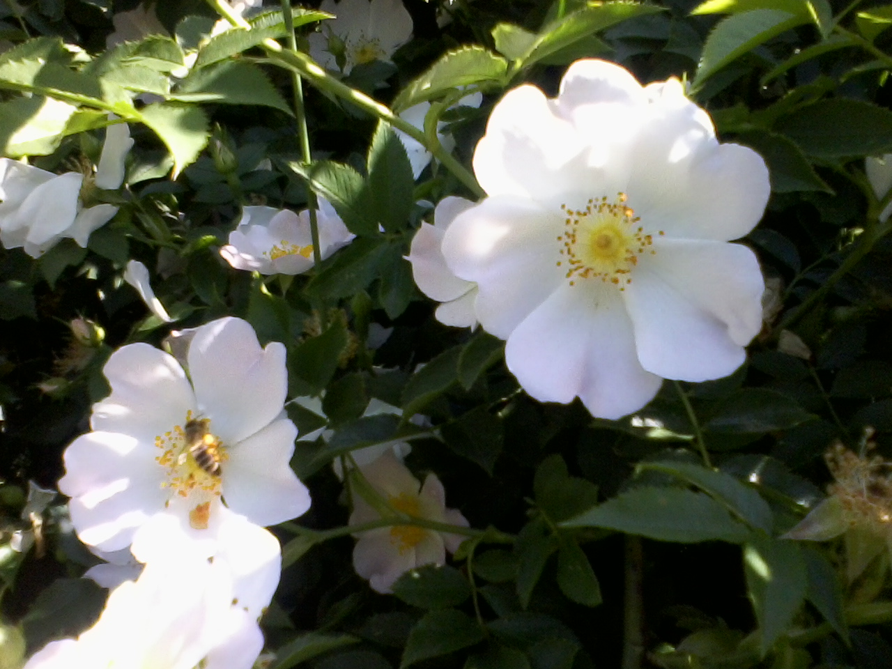 Rosa gallica, var. Exularia